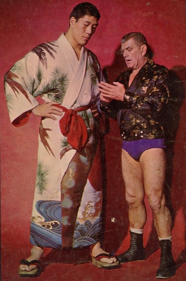 Magazine Official Wrestling d'août 1964 avec notamment Giant Baba.